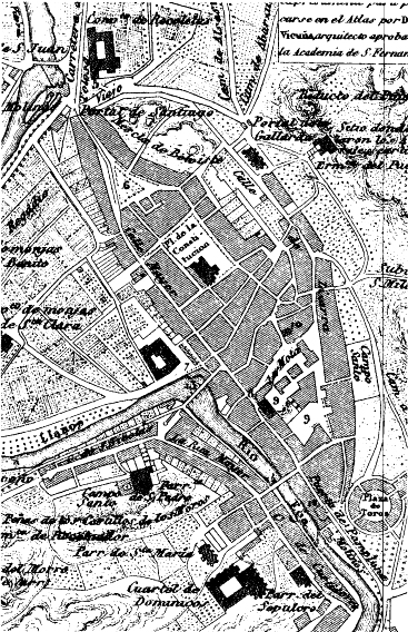 Lizarra, F. Coelloren arabera.